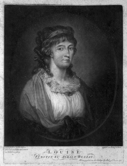 Luise von Anhalt-Dessau (1750–1811), geb. Prinzessin von Brandenburg-Schwedt